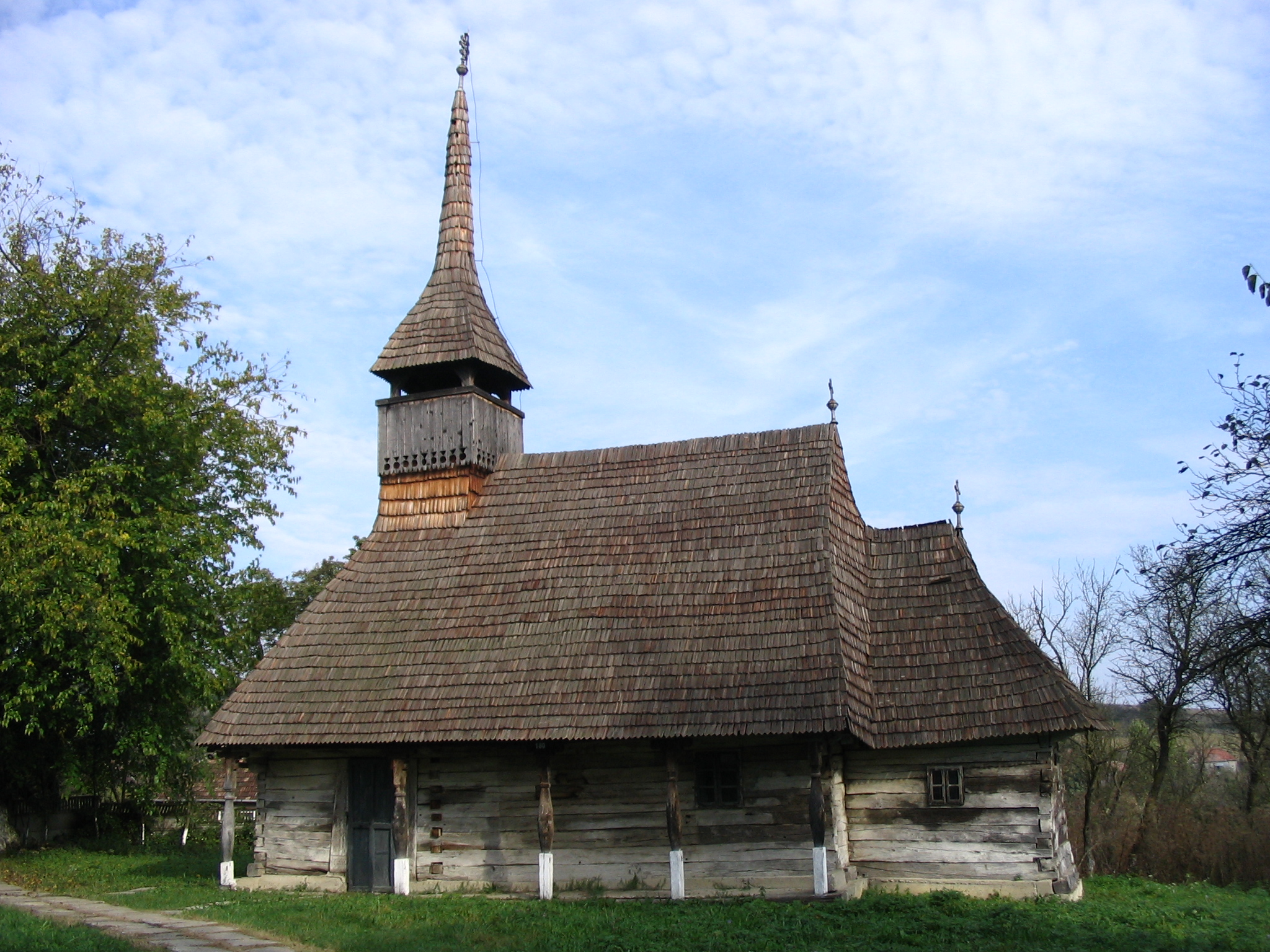 Biserica de lemn din Sighetu Silvaniei, Sălaj. Autor: Bogdan Ilieş şi Ada Baghiu Data: 2 octombrie 2005